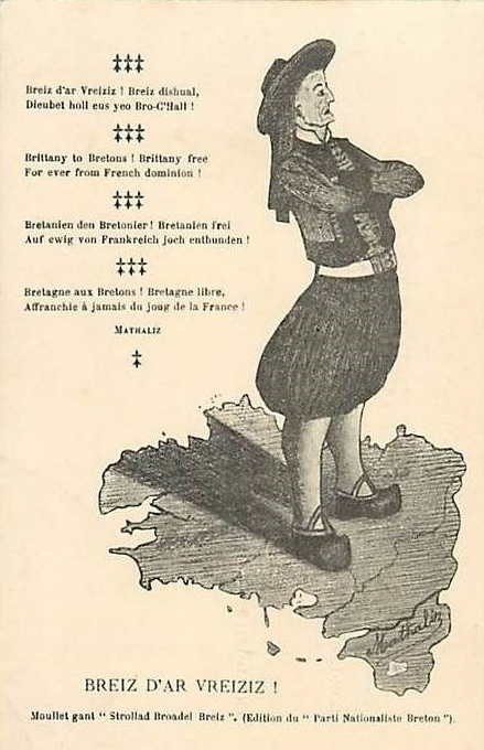 Carte postale du Parti nationaliste breton en quatre langue (breton, anglais, allemand, français) - 1912